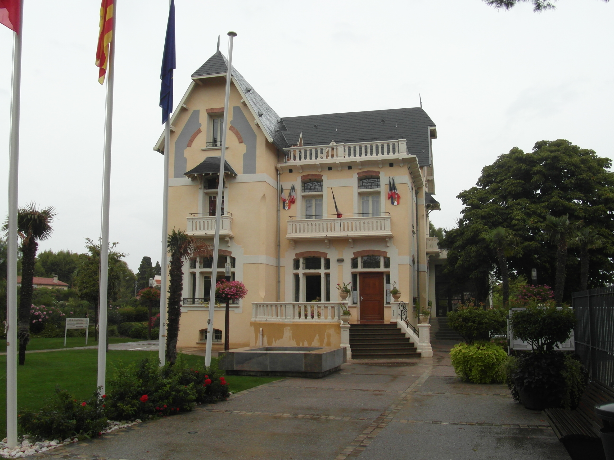 Mairie de Pézilla-la-Rivière (66)